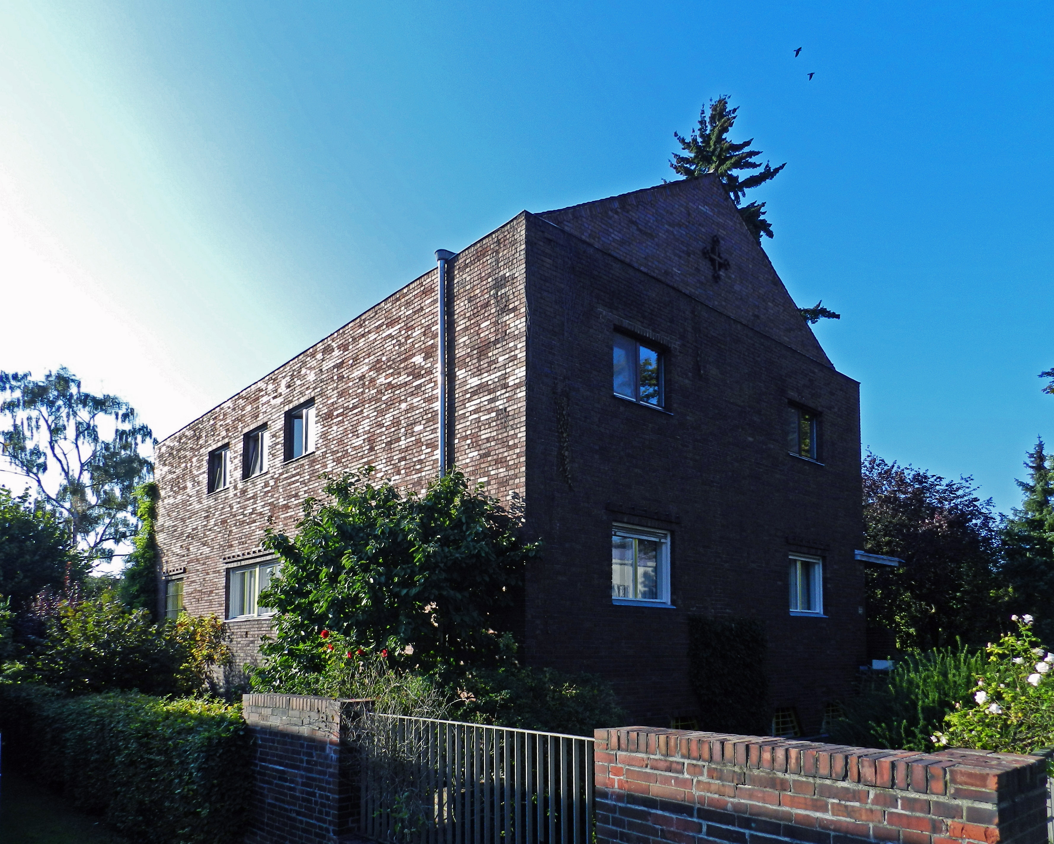 Einfamilienhaus Im Winkel 37, Berlin-Dahlem. Bauzeit: 1927-28, Entwurf: Wilhelm Fahlbusch, Bauherr: Wilhelm Fahlbusch.